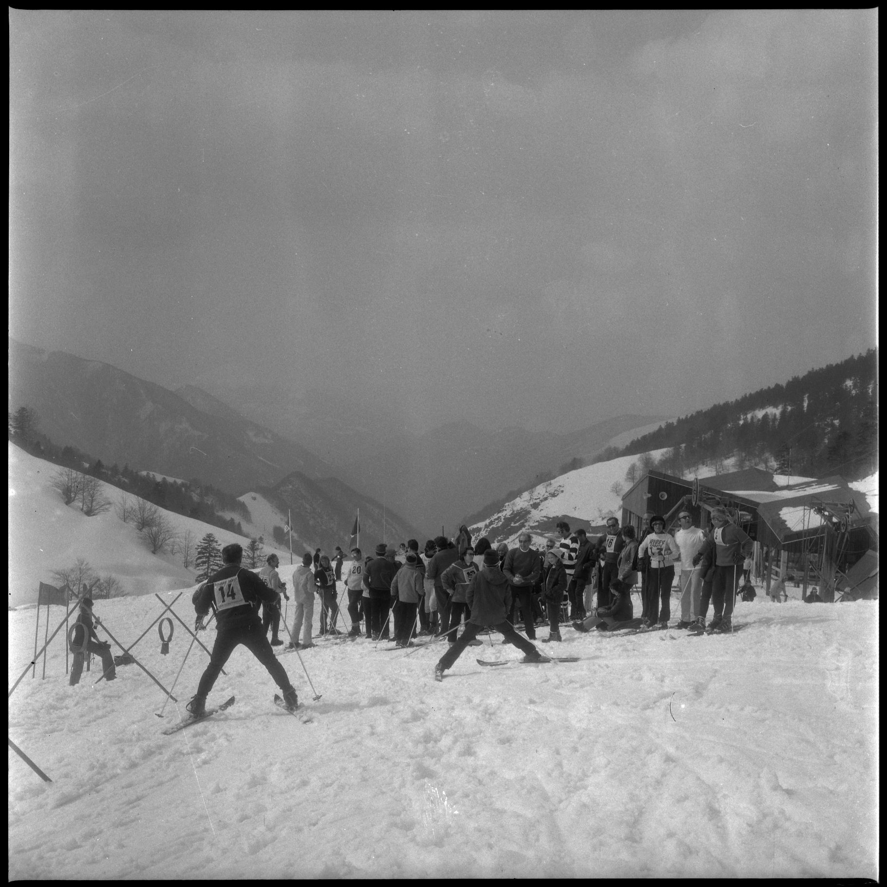 Buzet-sur-Neige (Haute-Garonne). 1 Avril 1971. Vue des journalistes à la station de ski de Buzet.